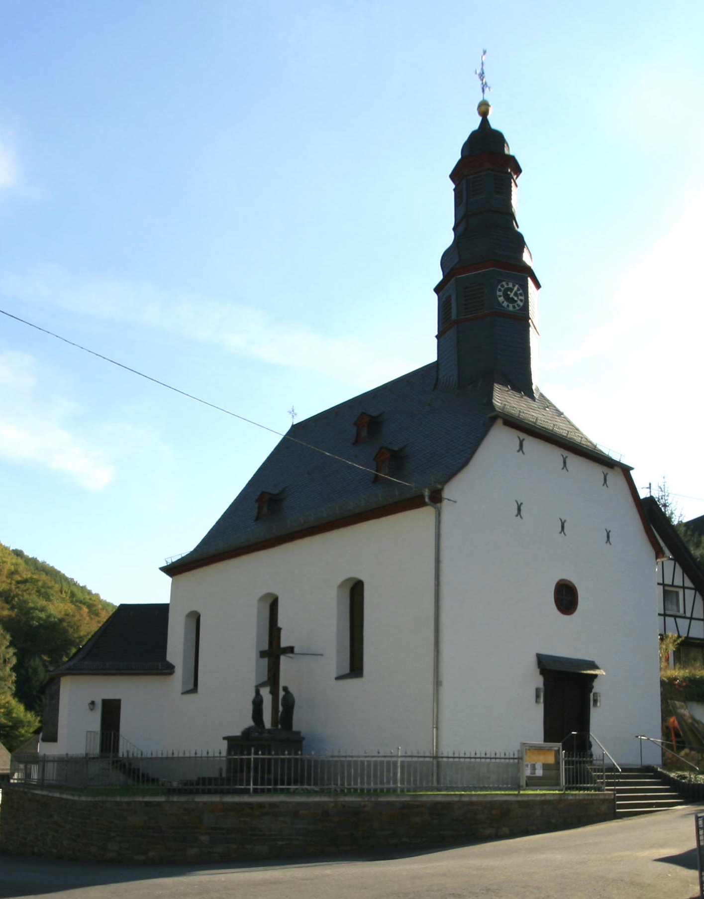 Kath. Pfarrkirche St. Anna in Sauerthal, Rhein-Lahn-Kreis. 1748.